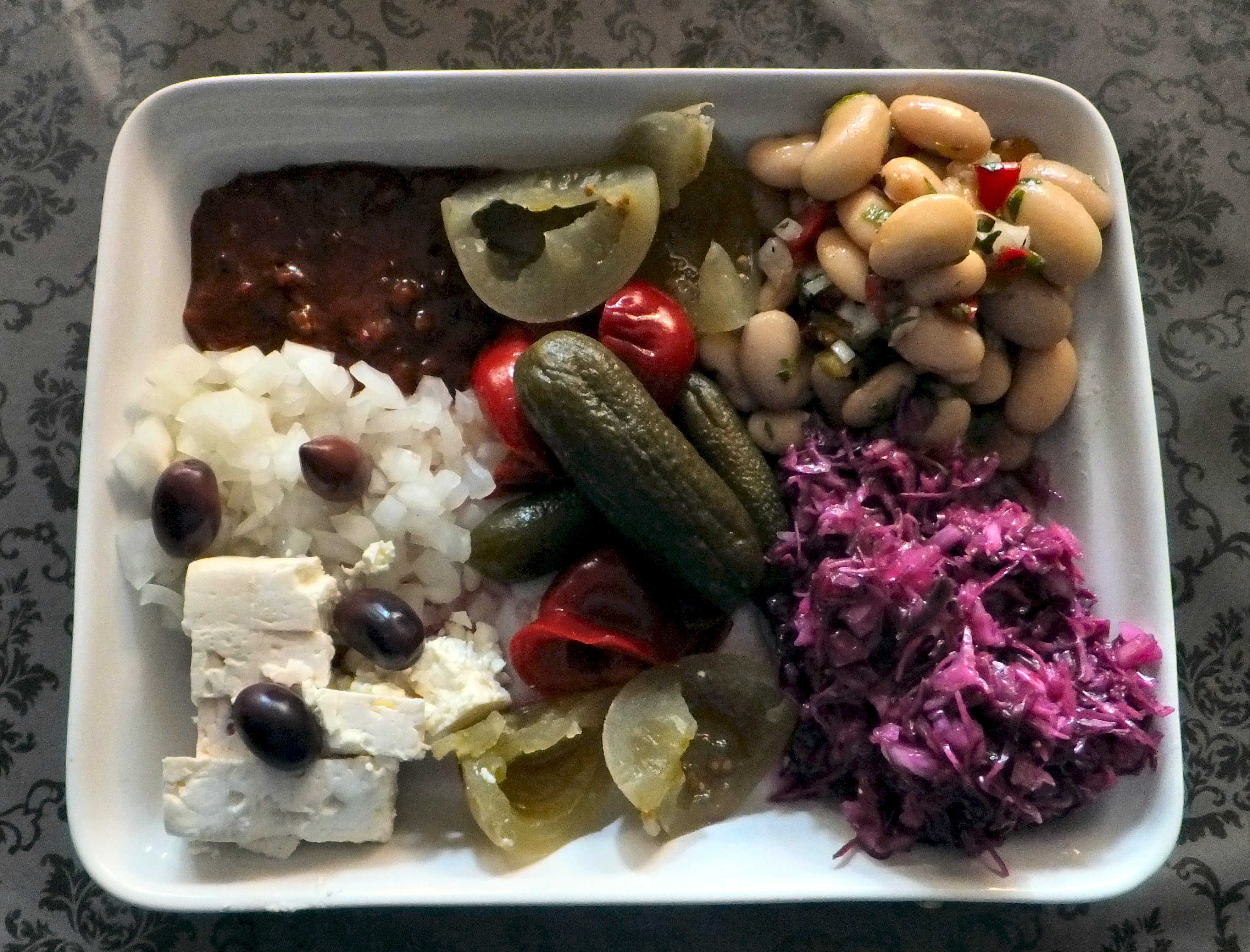 Beilagen zu Mici (Mititei)